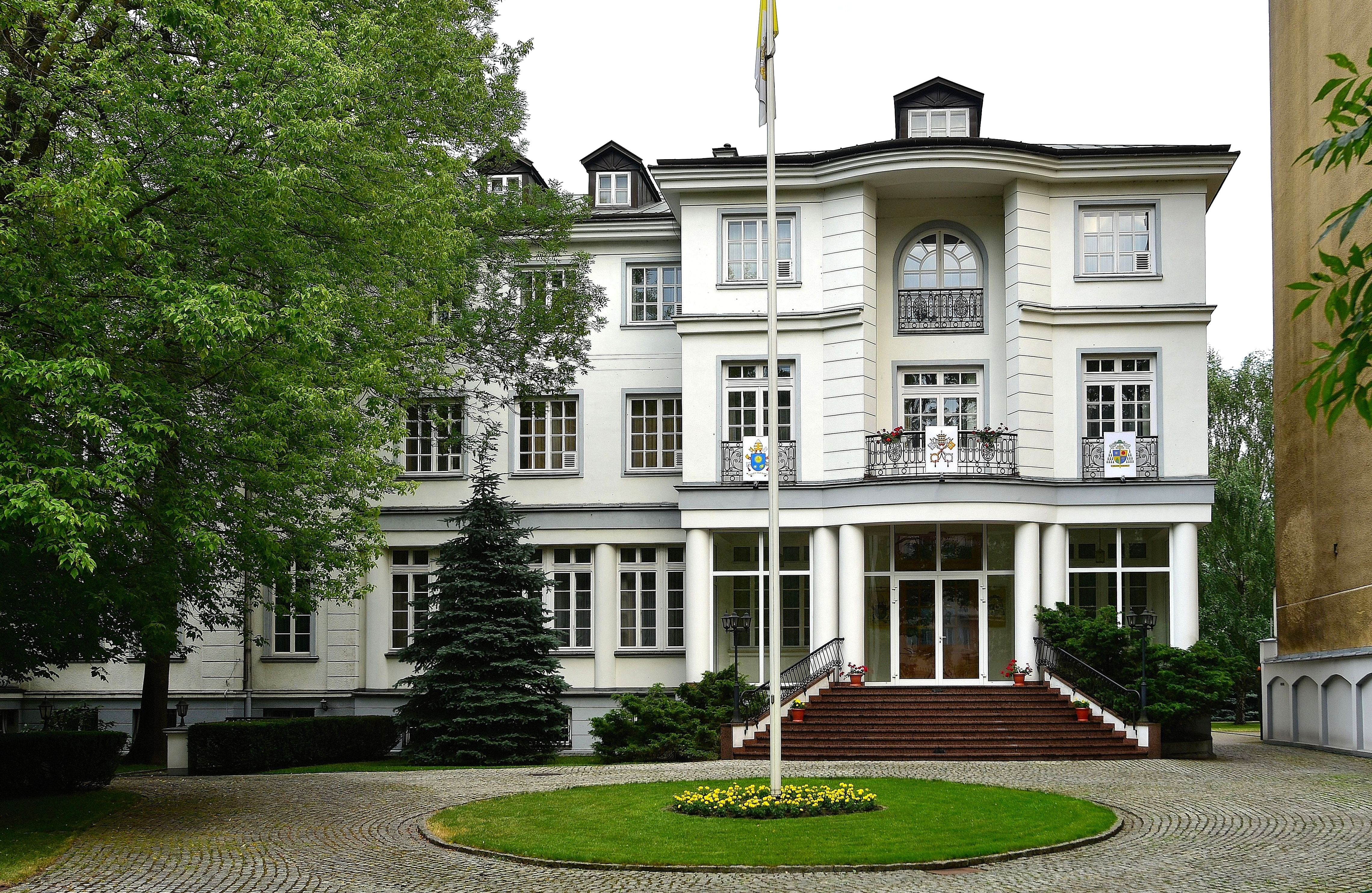 Nuncjatura Stolicy Apostolskiej w Polsce przy al. Szucha 12 w Warszawie